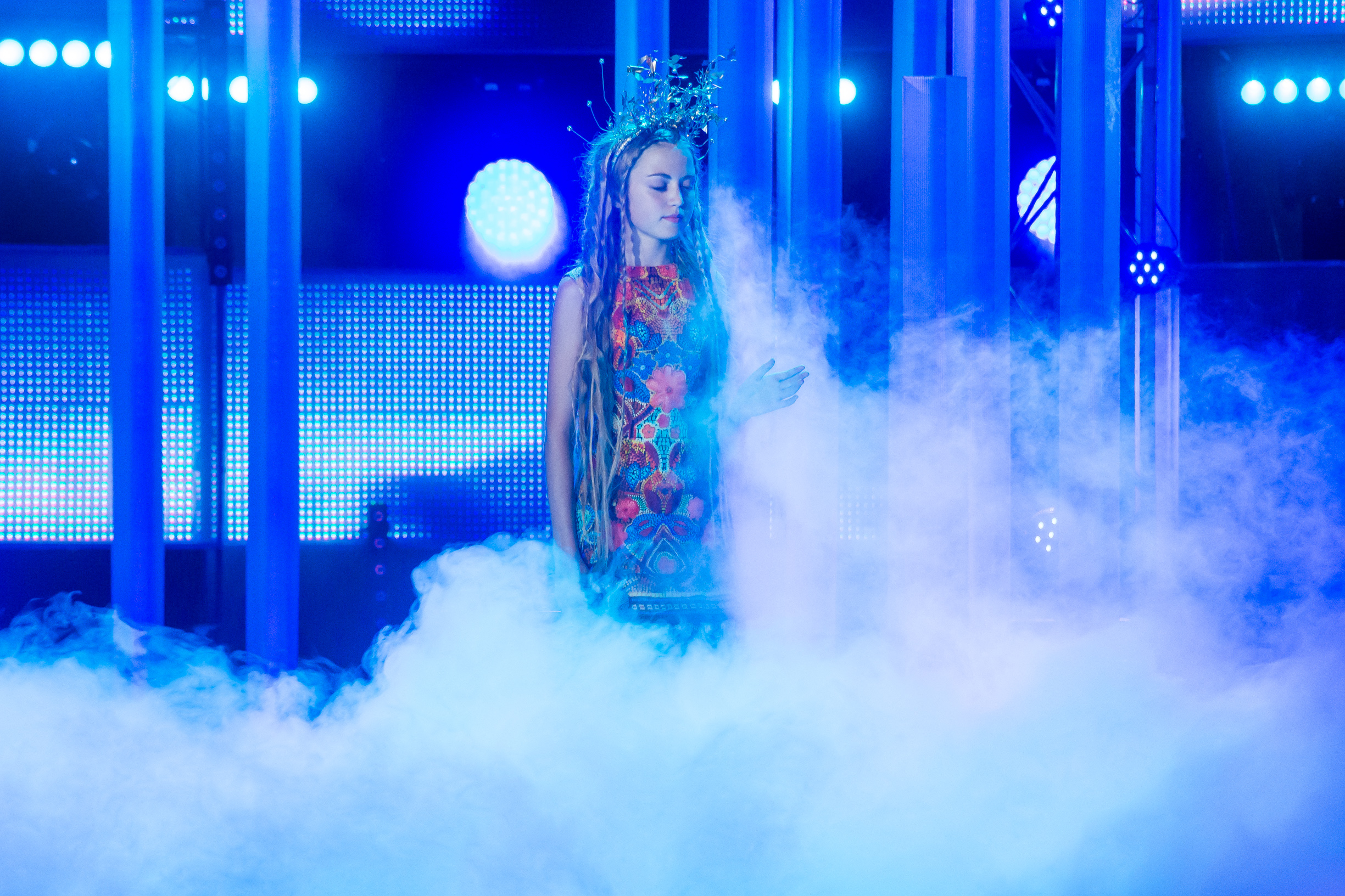 Софья Фисенко, российский отбор на Детское Евровидение 2016